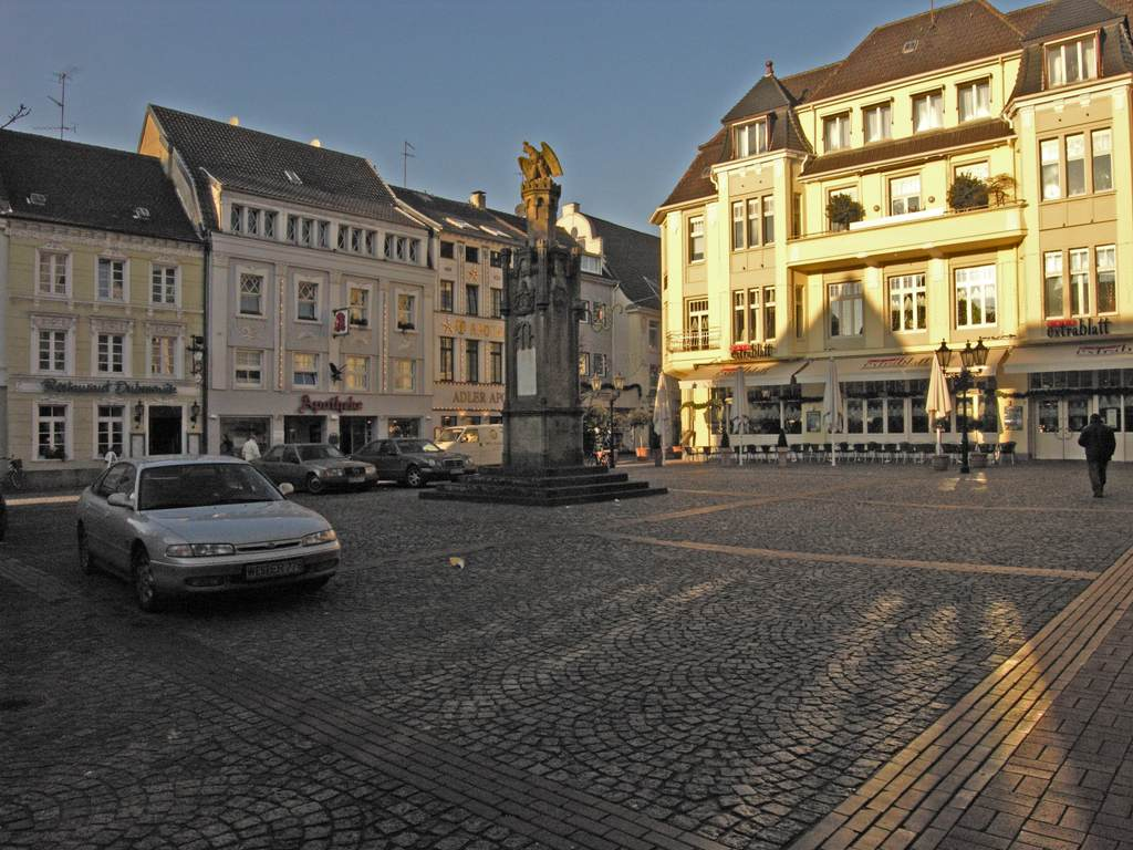 Altmarkt in Moers